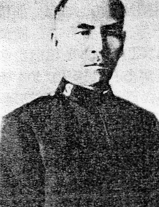 救世軍の軍服を着用している熊本バンド出身の金森通倫